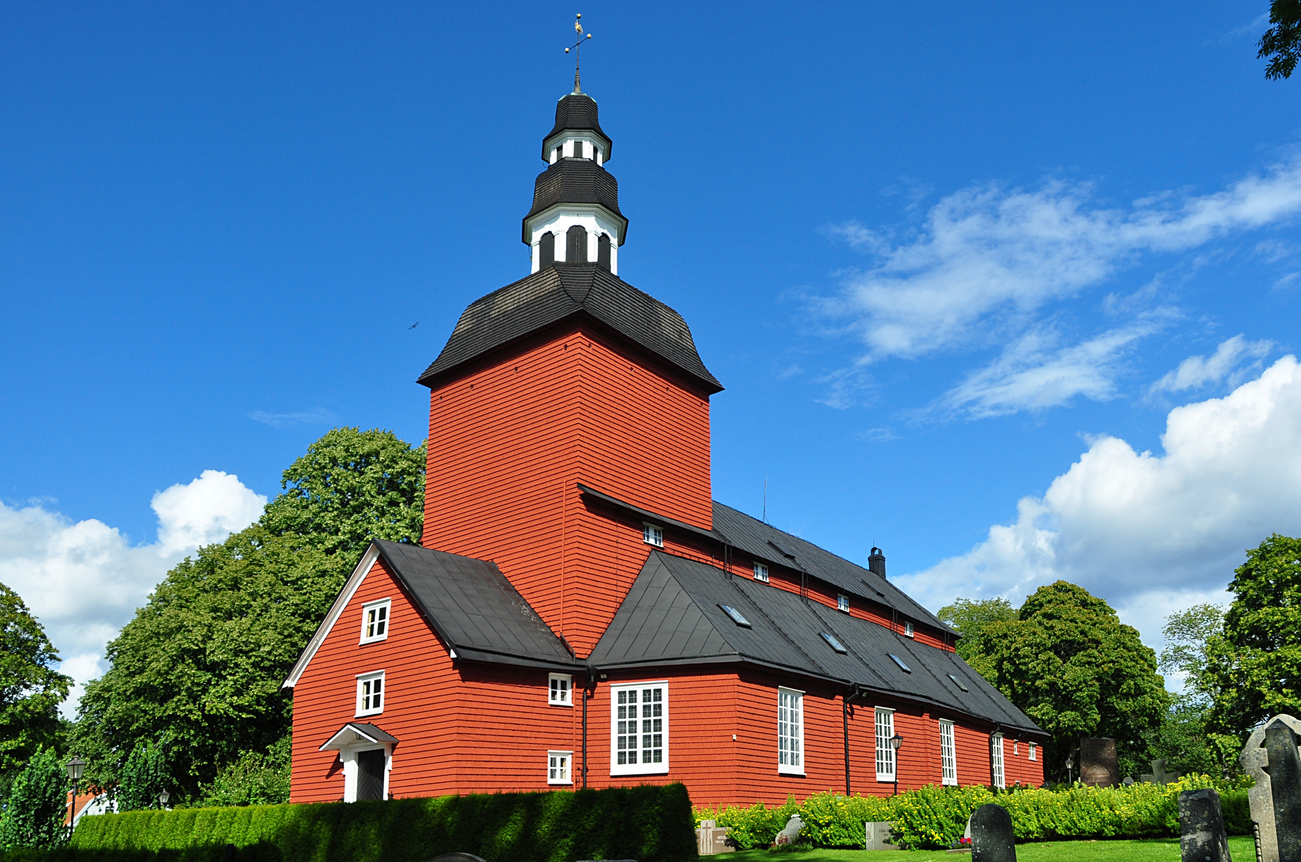 Habo kyrka i Skara stift, Jönköpings län. Kyrkan kallas ibland för Träkatedralen vid Vättern.